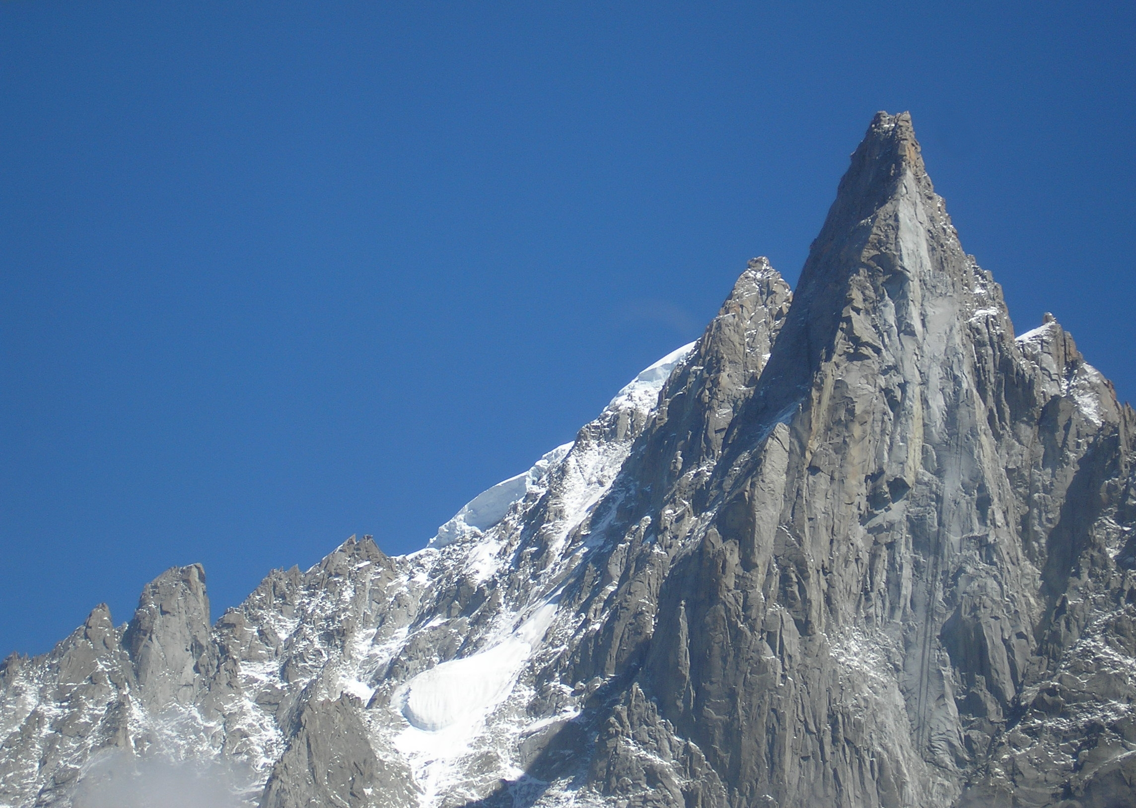 Face ouest des Drus (France)